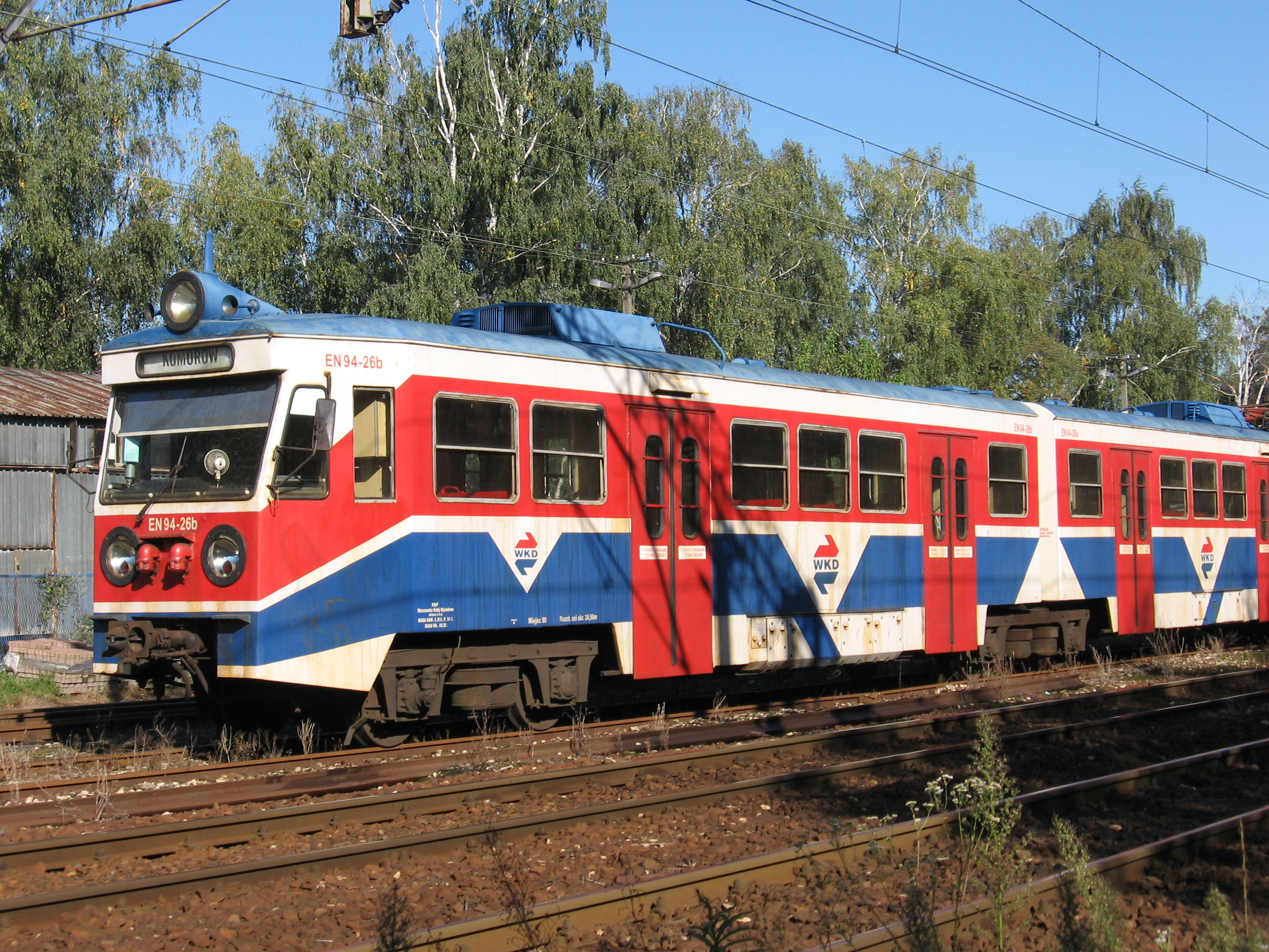 EN94 electric multiple unit at Komorow